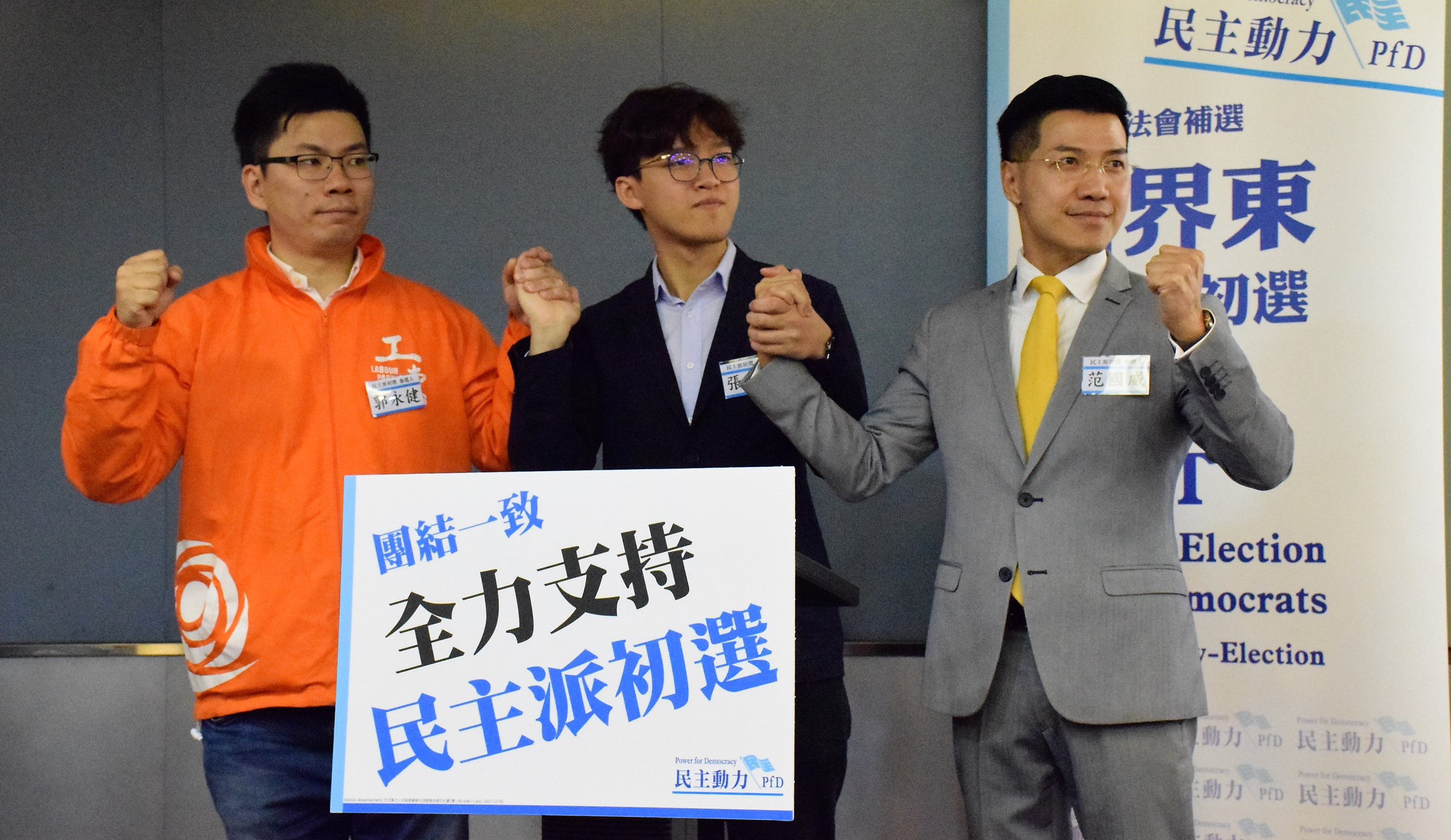 參與民主派新界東初選的3名參選人(左起)工黨主席郭永健、前學聯常委張秀賢、新同盟前立法會議員范國威。（美國之音湯惠芸）